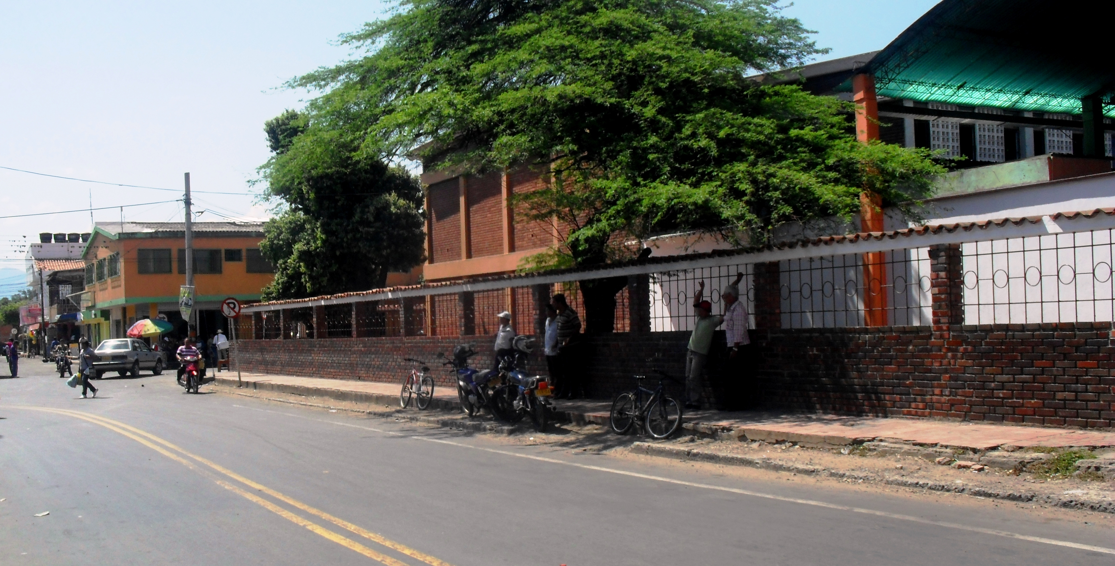 Vía principal Cúcuta-Ocaña en El zulia.